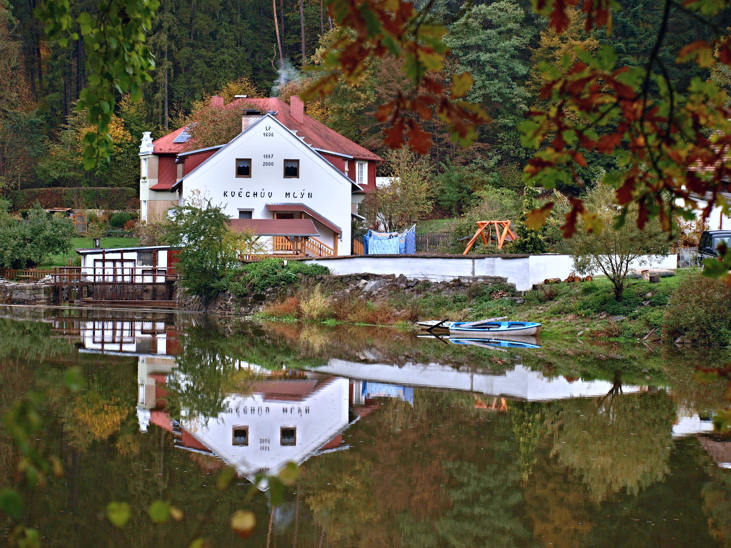 Dražice, Kvěchův mlýn